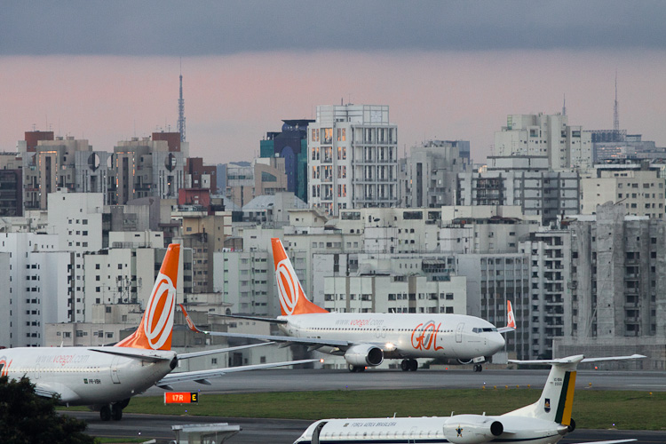 SÃO PAULO. Aviões na pista do aeroporto de Congonhas.